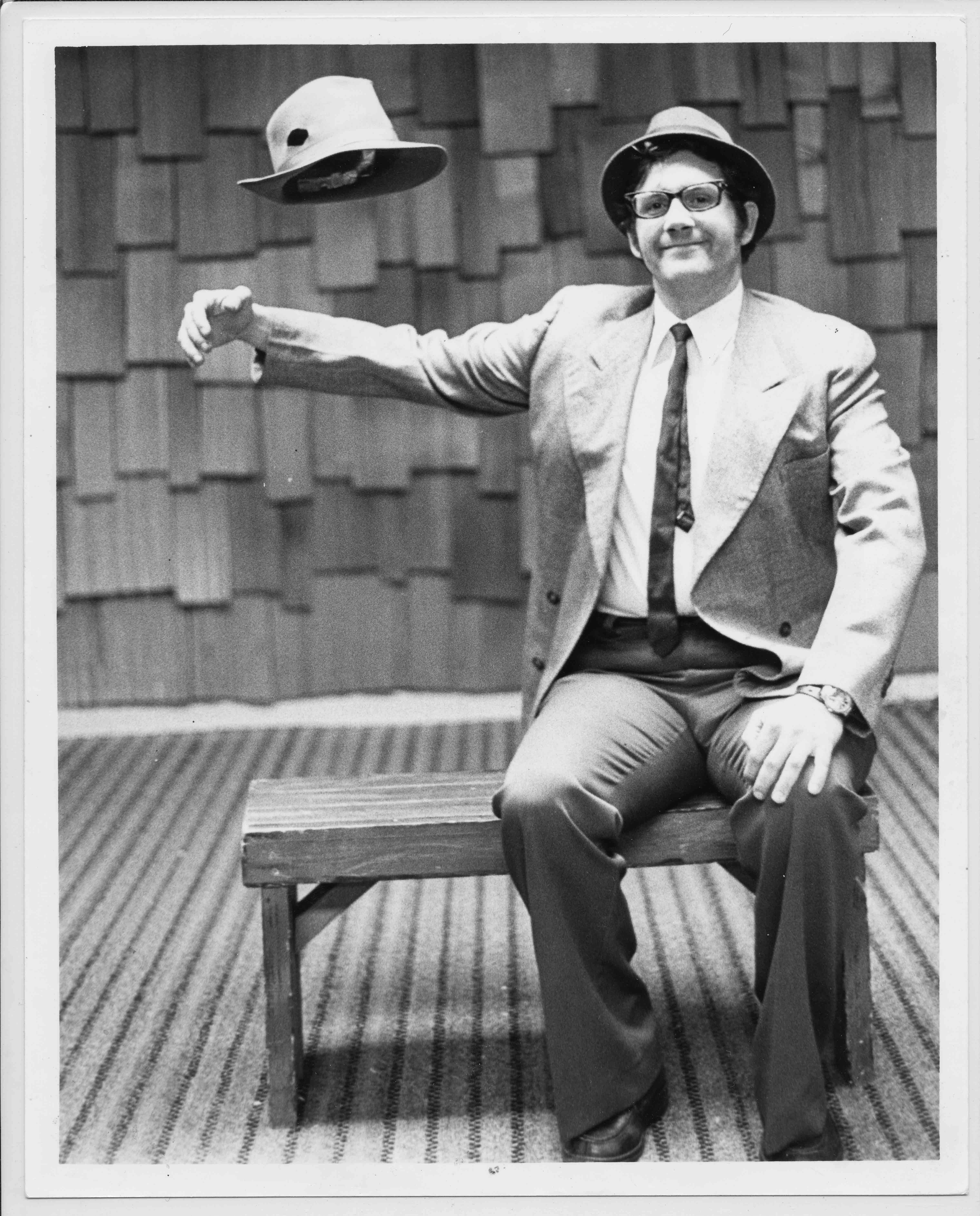 Harvey2